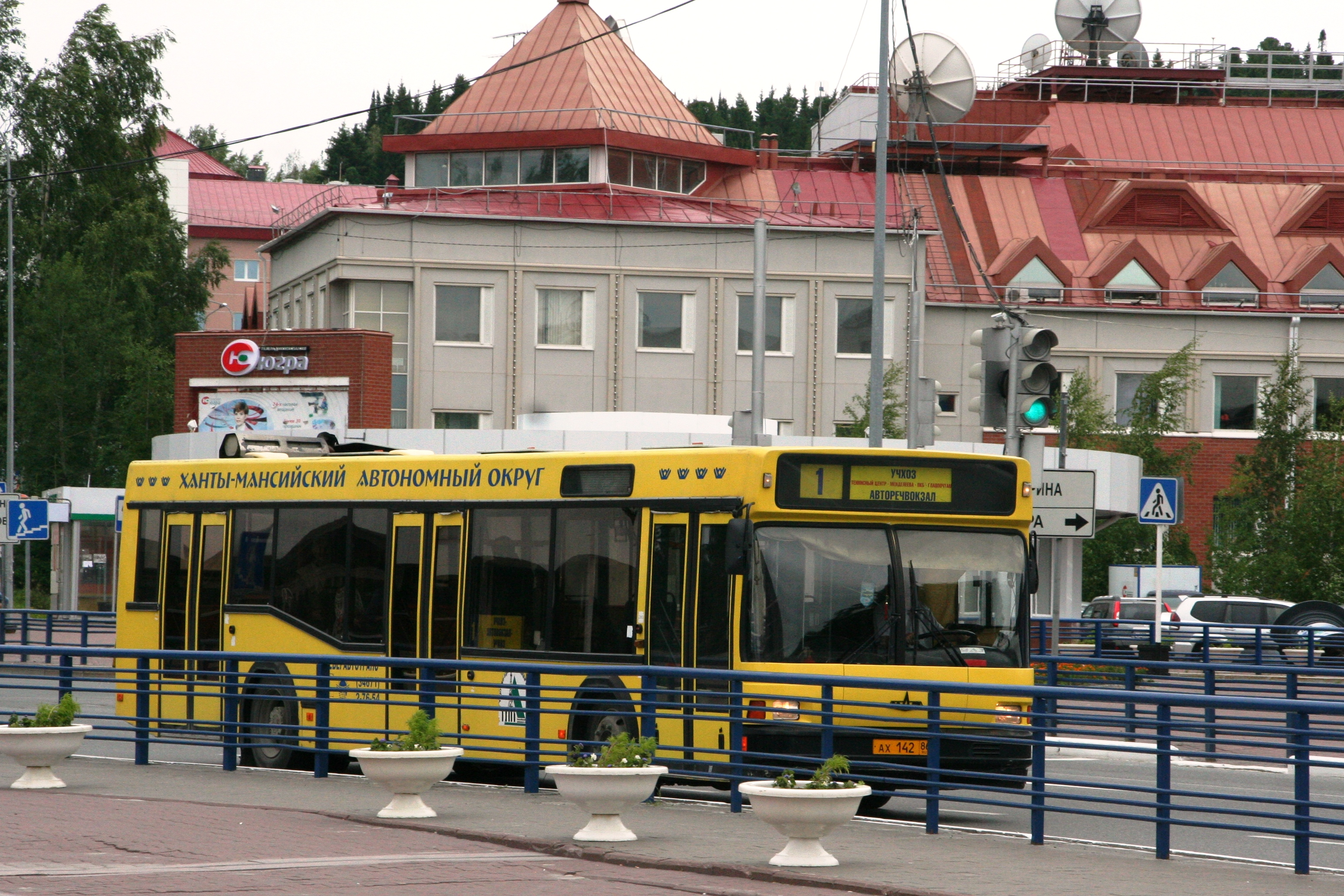 ein MAZ-103-Bus im russischen Chanti-Mansiisk